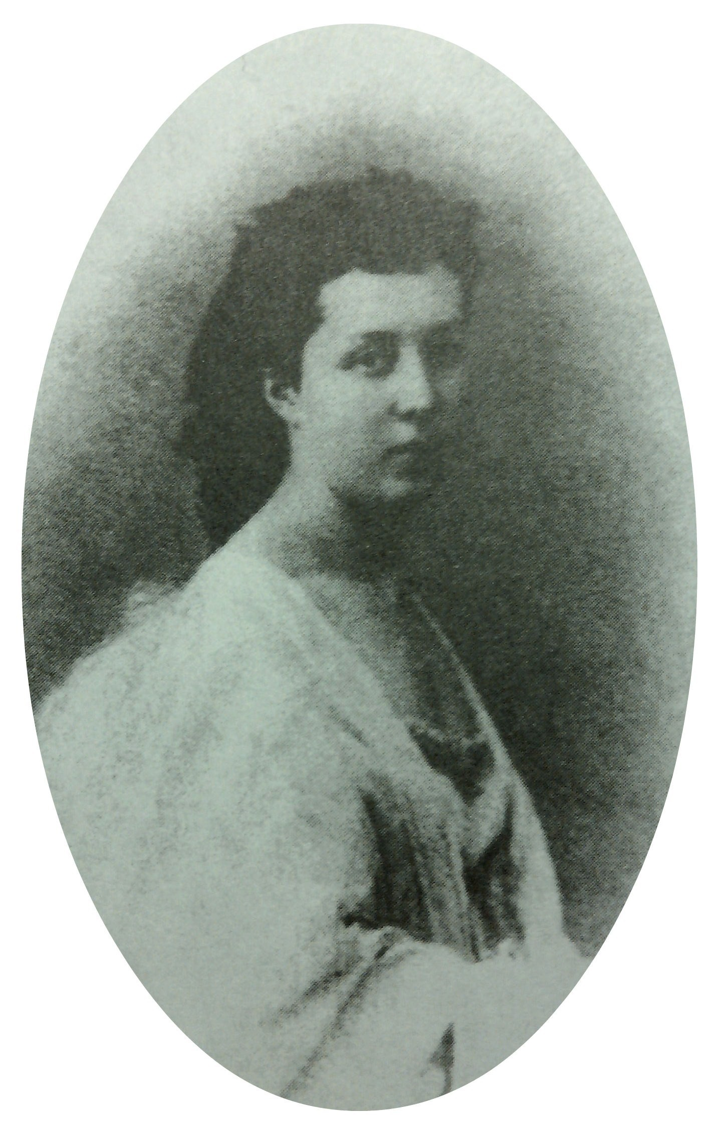 Люция Карловна Нарышкина, ур. Штрандман (1832—1895)